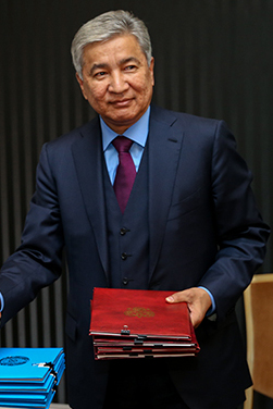 Министр обороны Республики Казахстан Имангали Тасмагамбетов